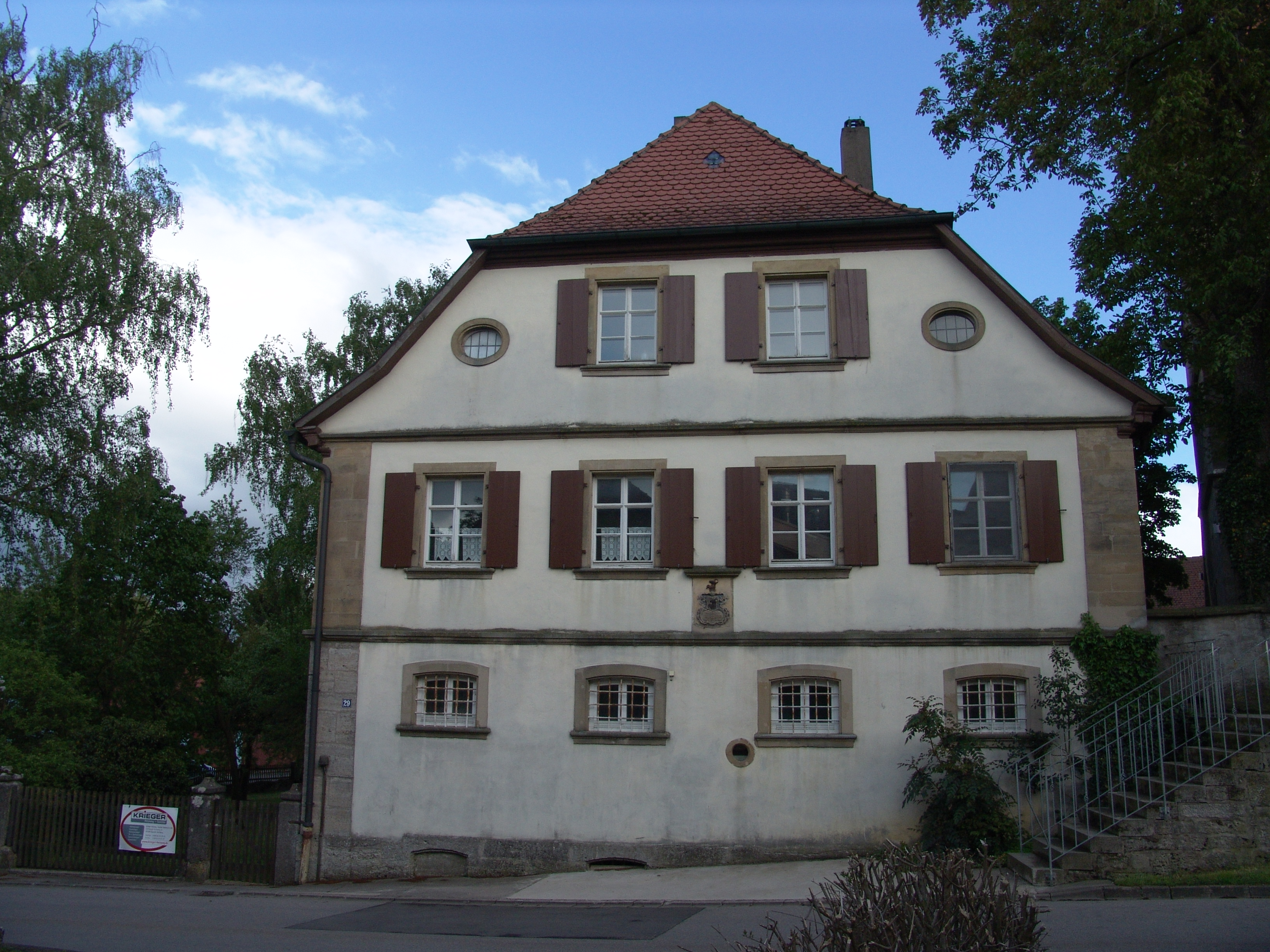 Evangelisches Pfarrhaus